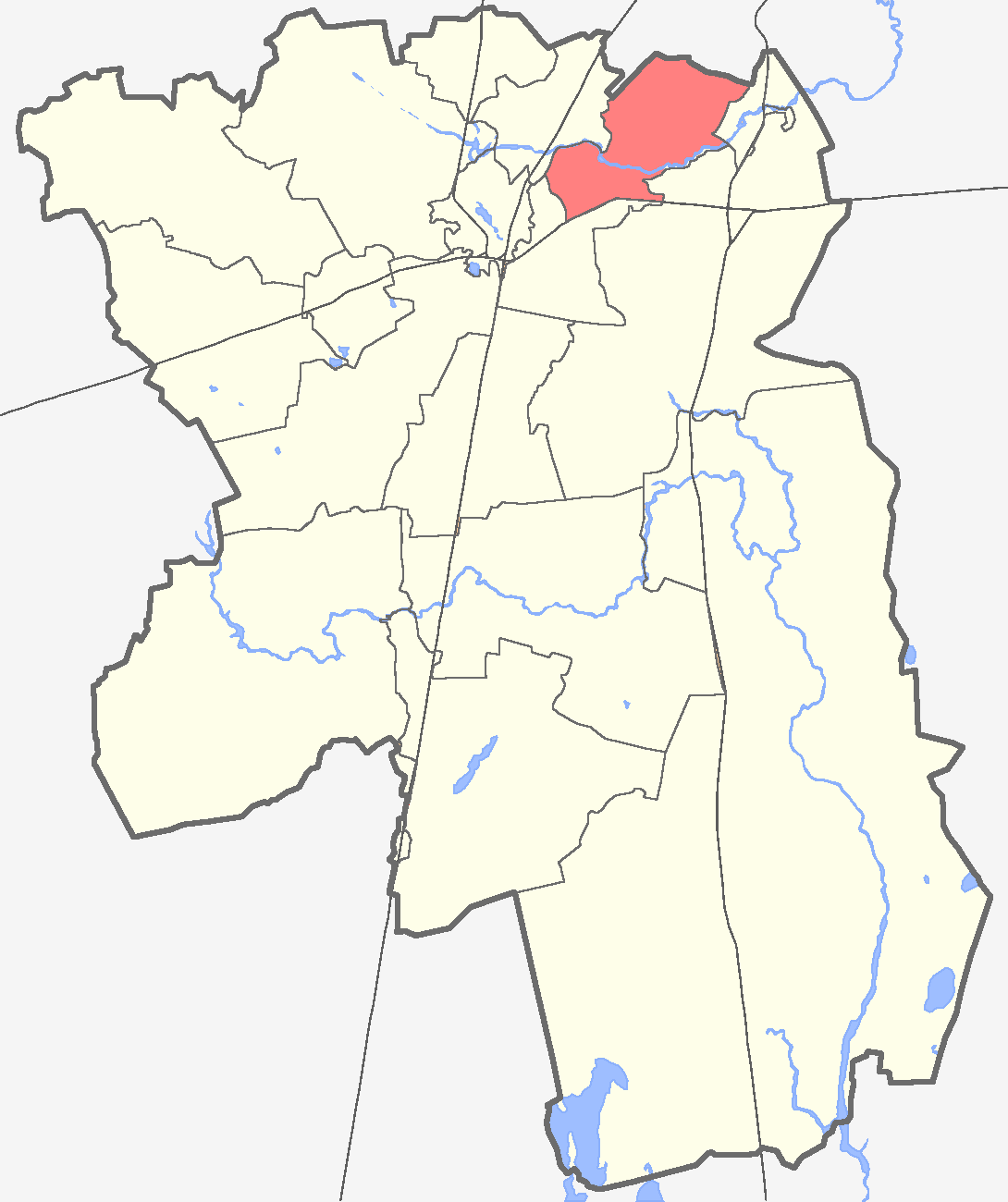 Пудомягское сельское поселение на карте Гатчинского района